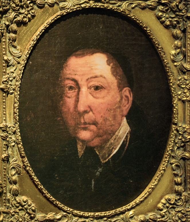 Gemälde - Portrait des Weltenburger Abtes Maurus Bächel aus dem dortigen Klostermuseum, Foto: Bieri 2019